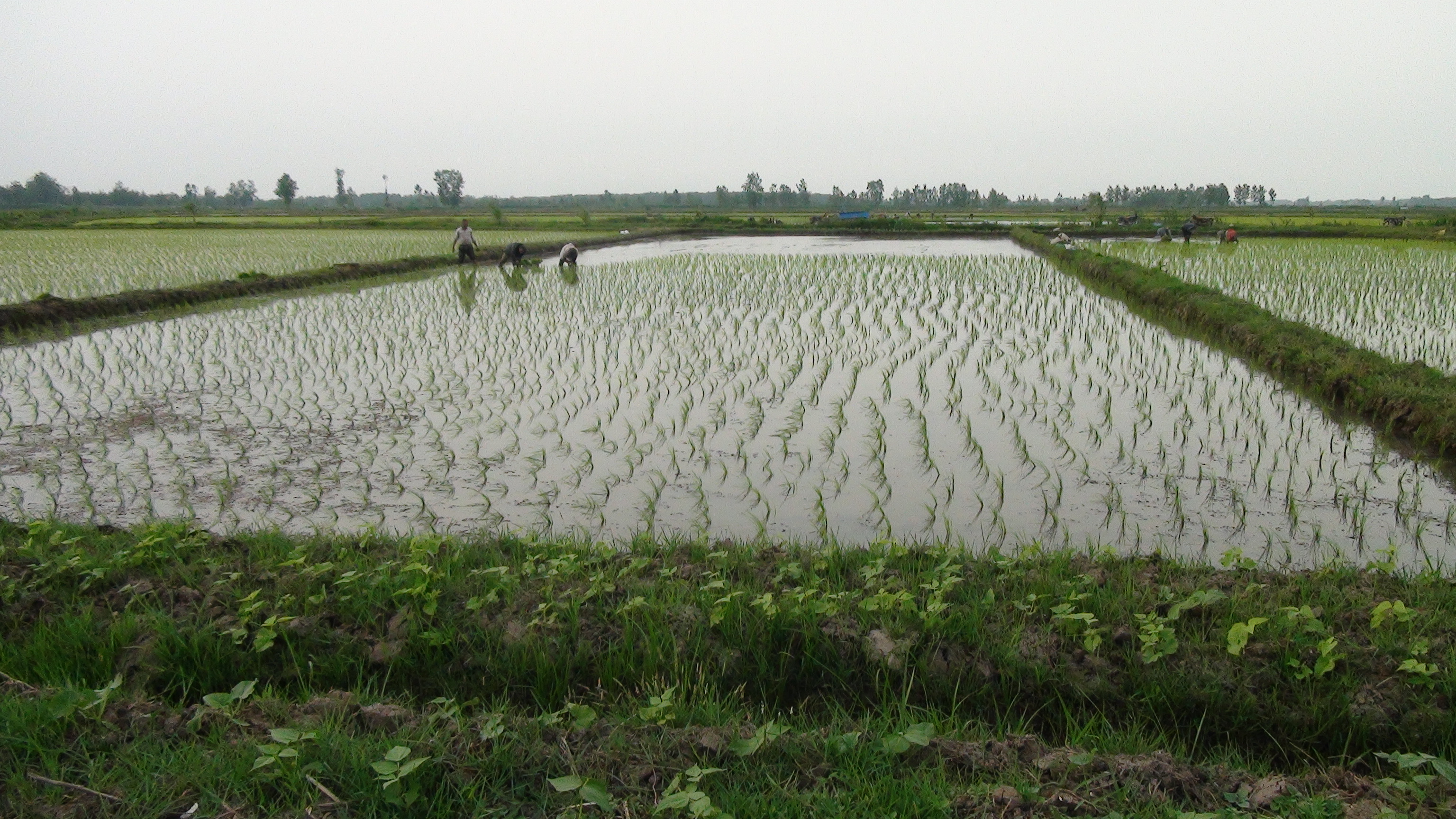 مزارع کشاورزی روستای کچلام